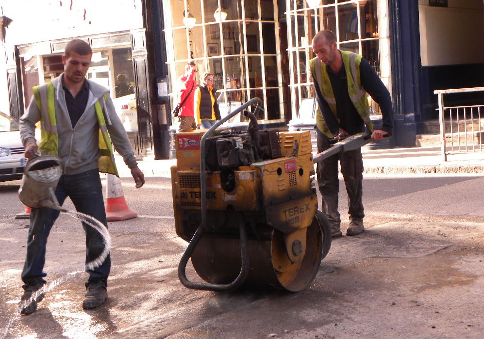 Rouleau compresseur de petite taille utilisé pour des petits travaux (ici réparation de tranchée) cliché pris à York (G-B)